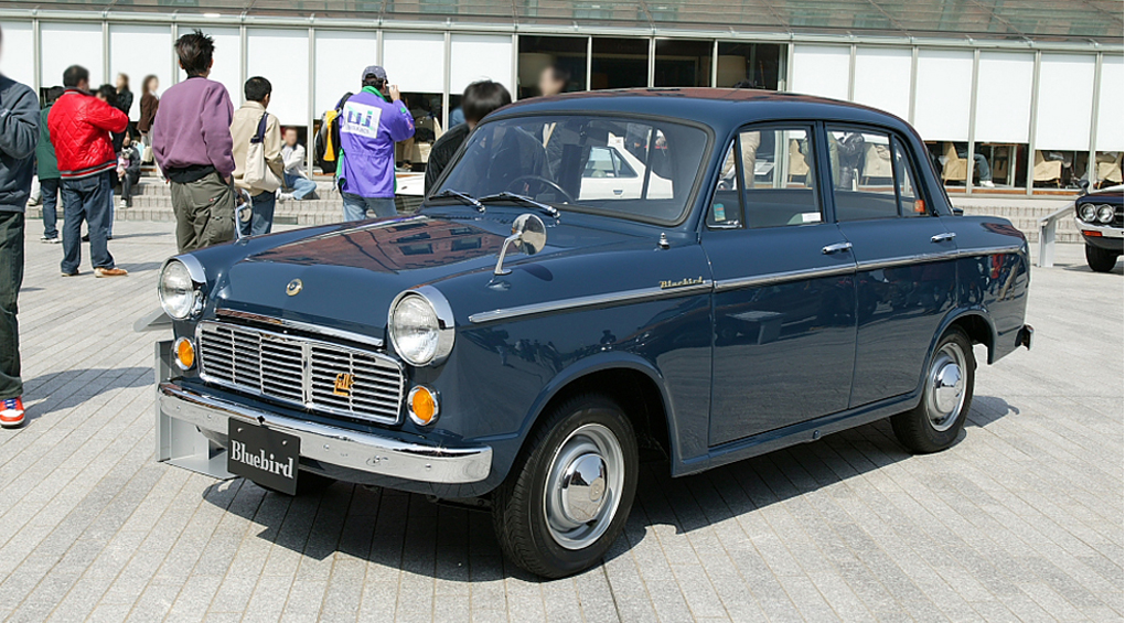 First generation Datsun Bluebird 1200 ( 310 series Type P311 )